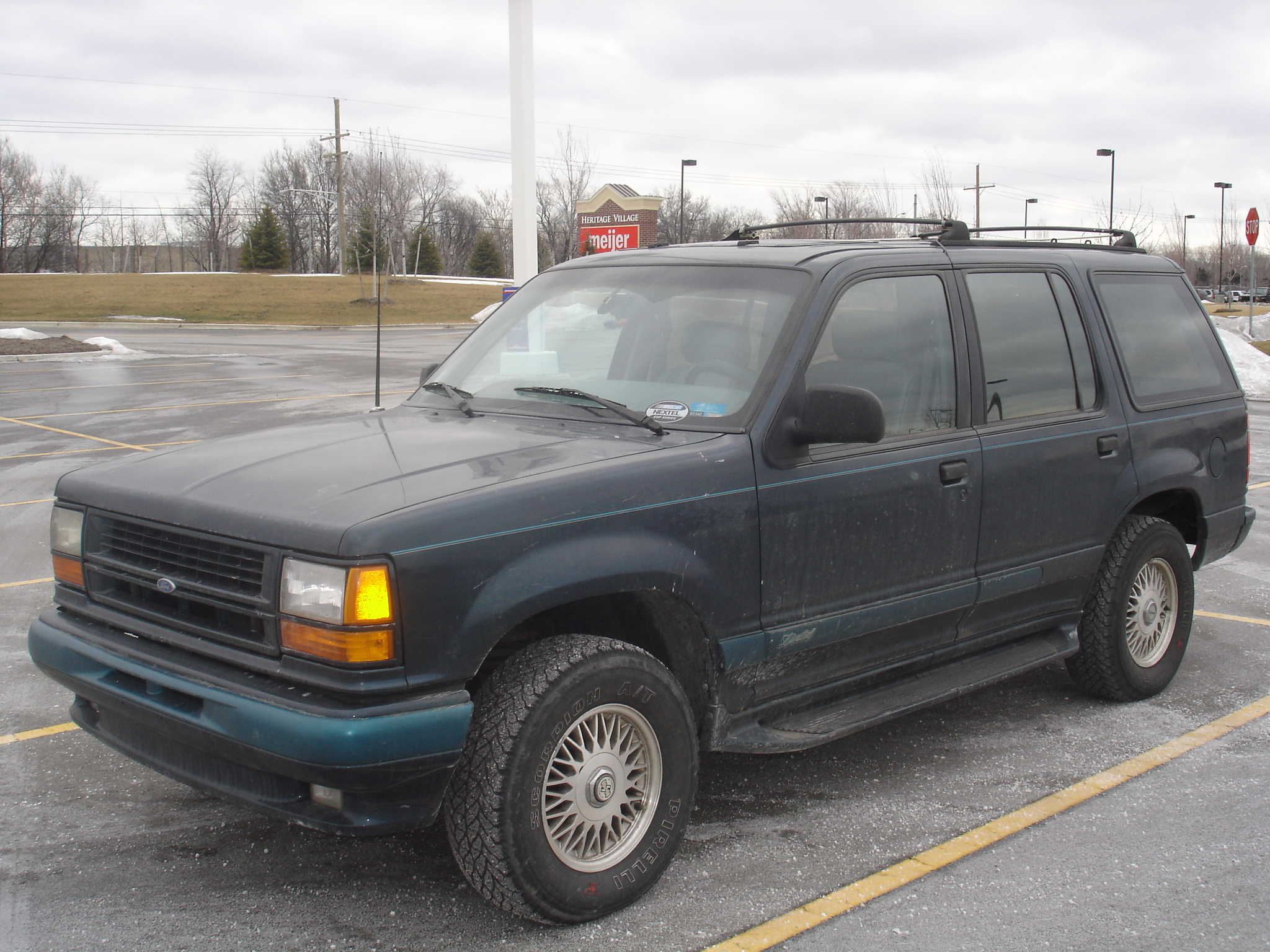 1992 Ford Explorer